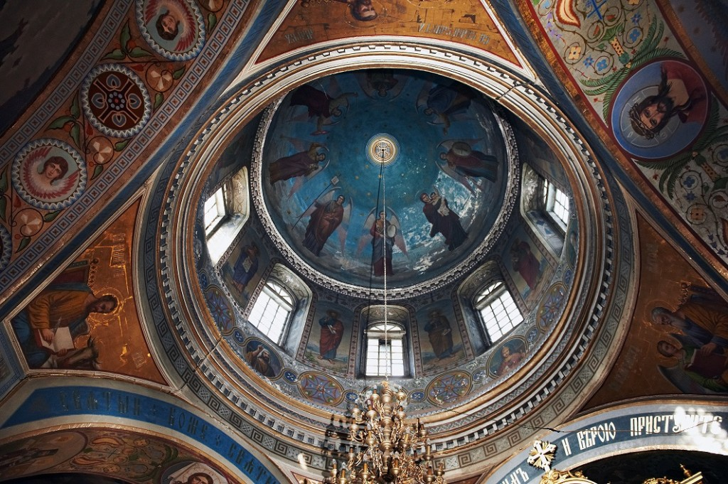 Купол собора